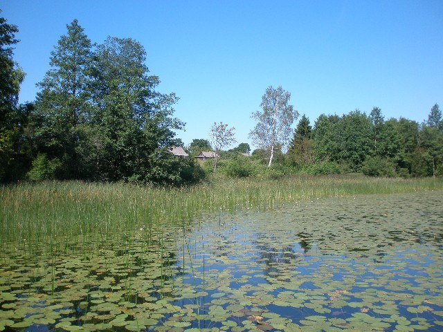 Псковская область, Невельский район, Голубозёрская волость, деревня Паникли, озеро Ермаки (2013 год)